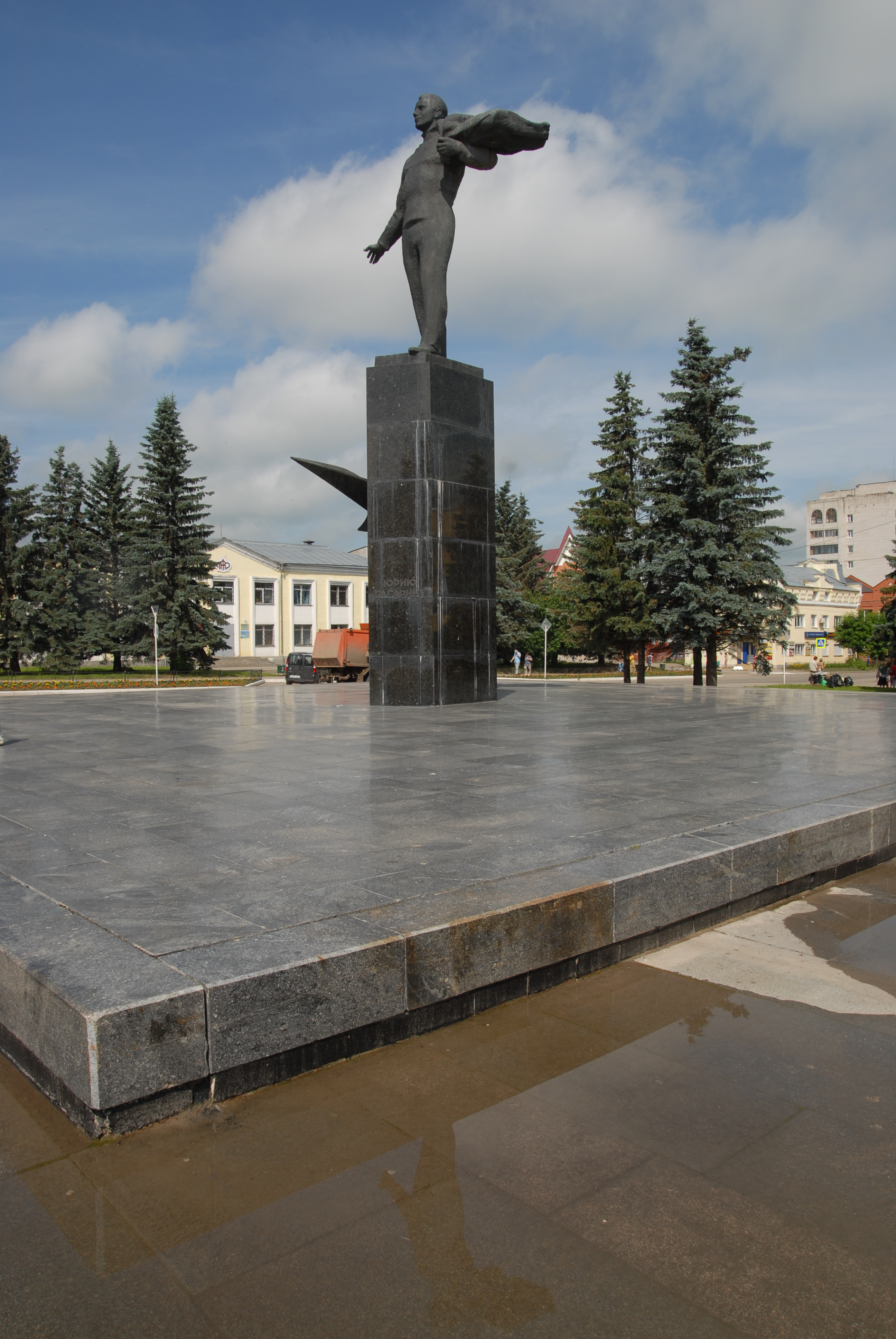 Памятник Ю.А. Гагарину: площадь Красная, Гагарин, Гагаринский район, Смоленская область